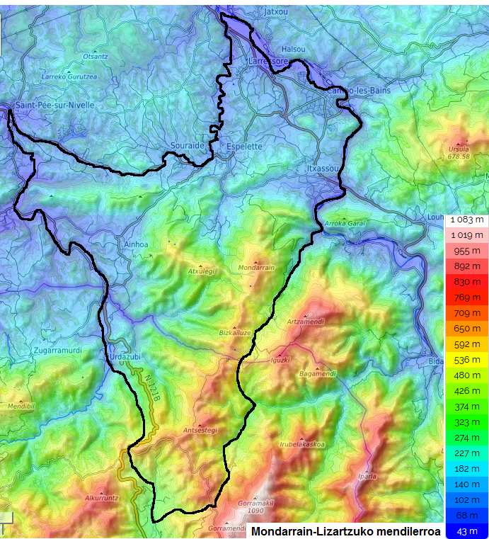 Mondarrain-Lizartzuko mendilerroaren mapa topografikoa.